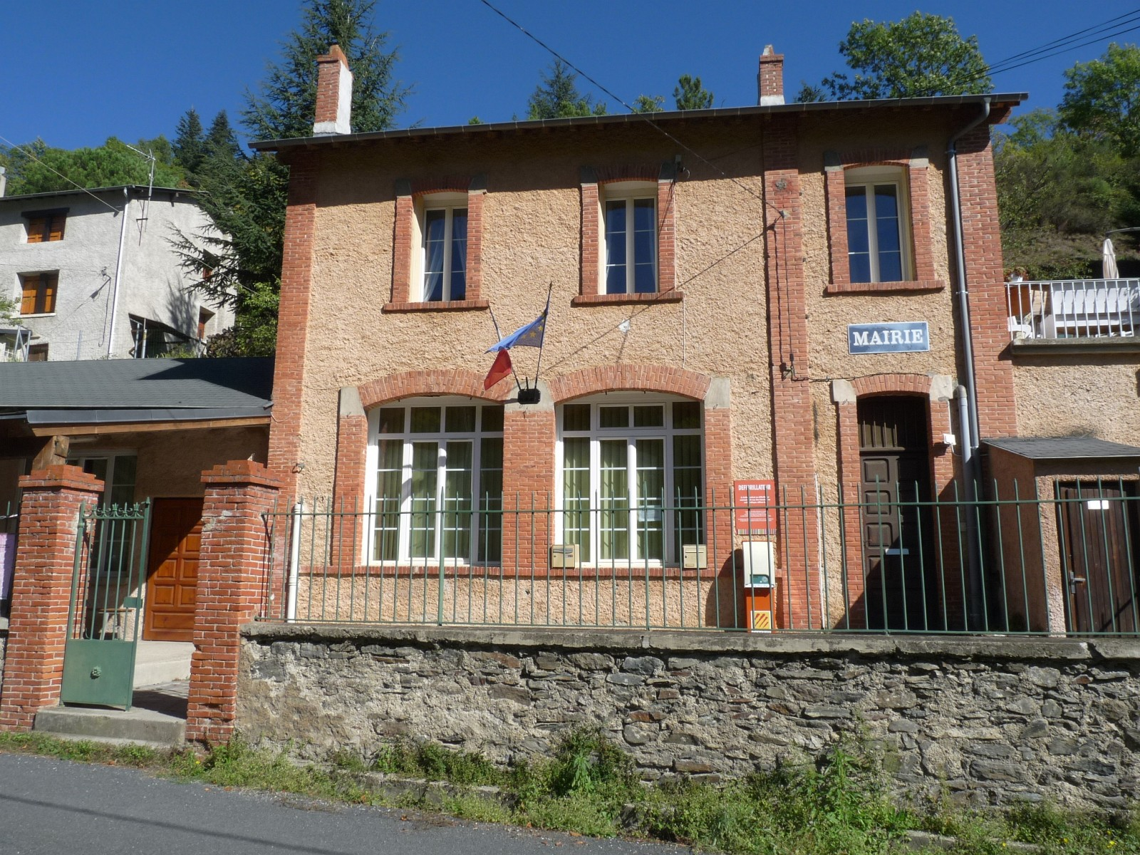 Mairie d'Urbanya, Pyrénées-Orientales, France